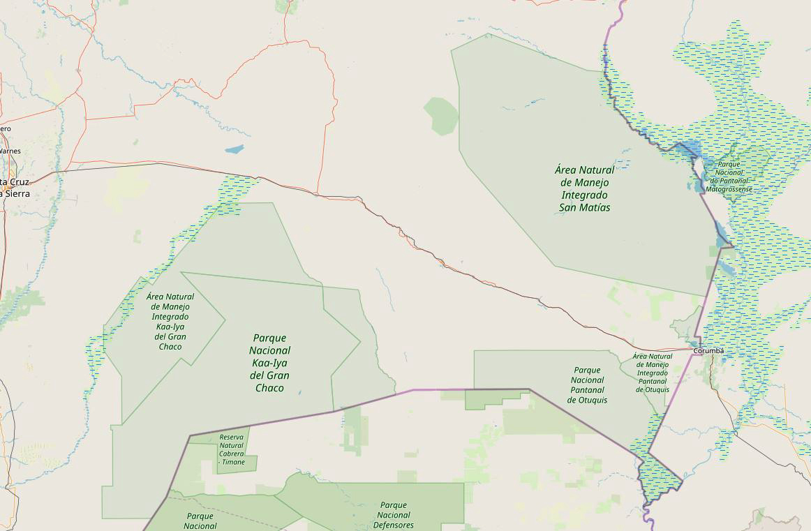 Mapa de áreas protegidas del departamento de Santa Cruz en OpenStreetMap en 2019